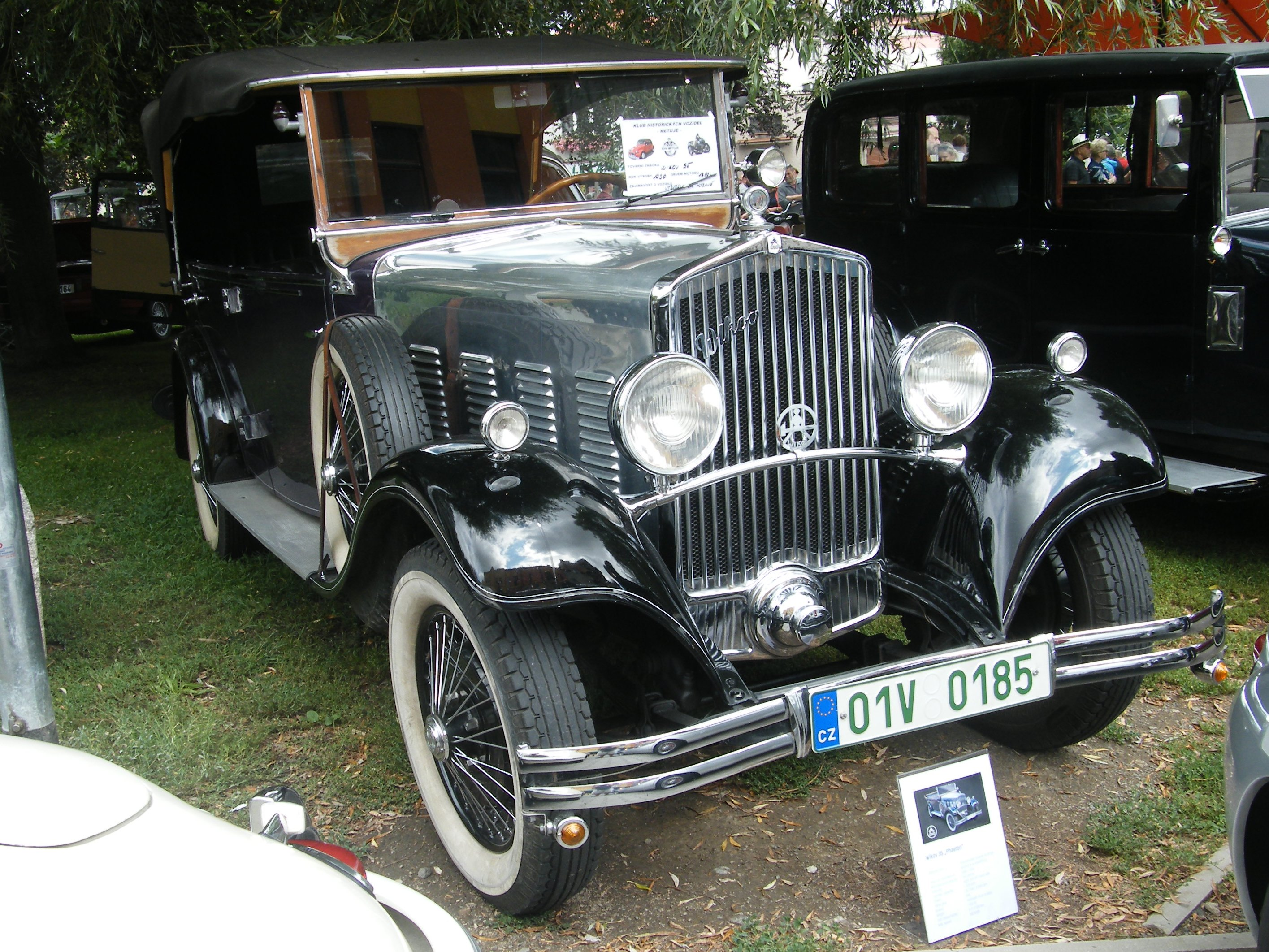 Wikov 35 Phaeton